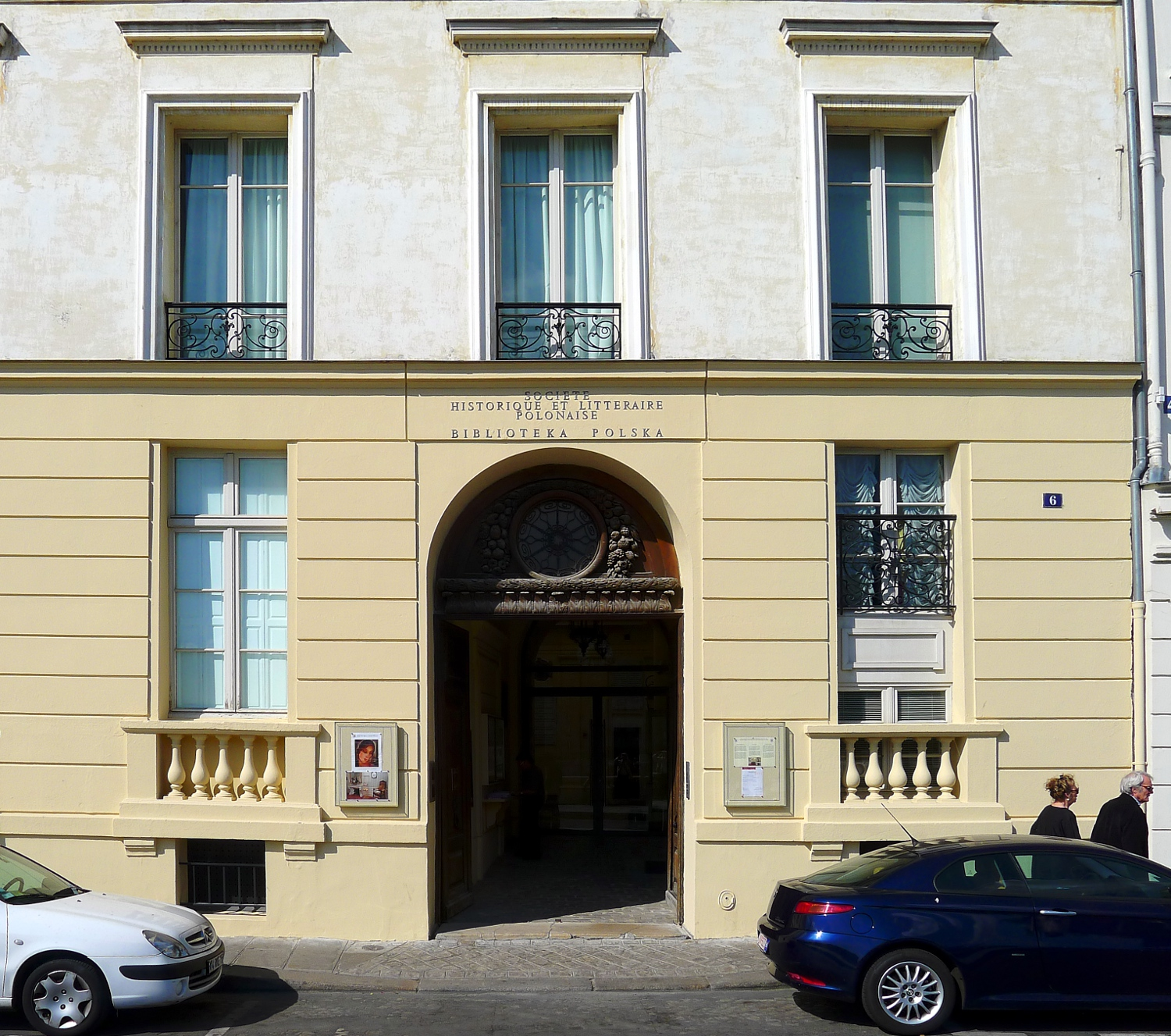 Qaui d'Orléans (n°6, bibliothèque polonaise) - Paris IV .